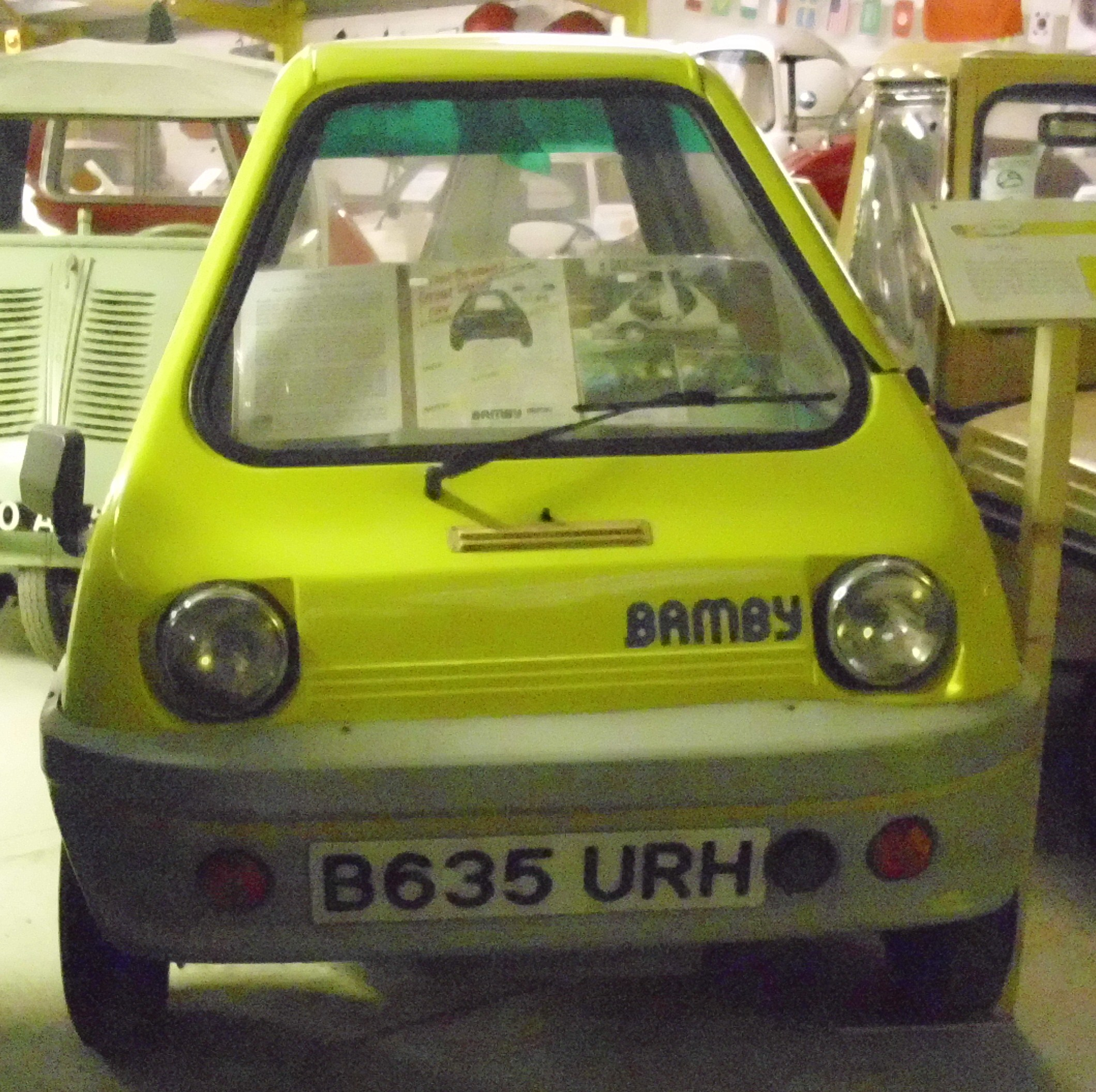 Bamby